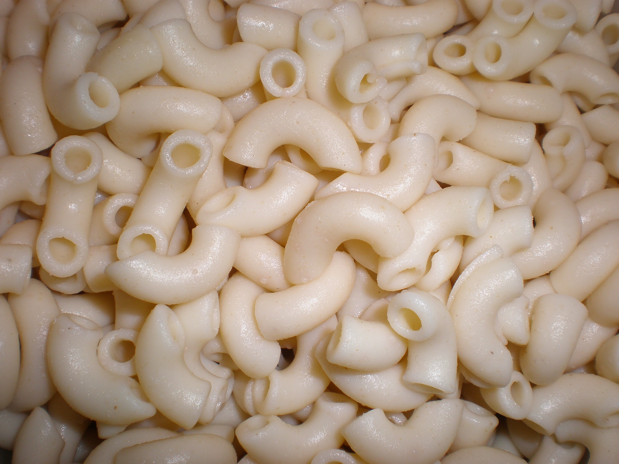 Boiled macaroni